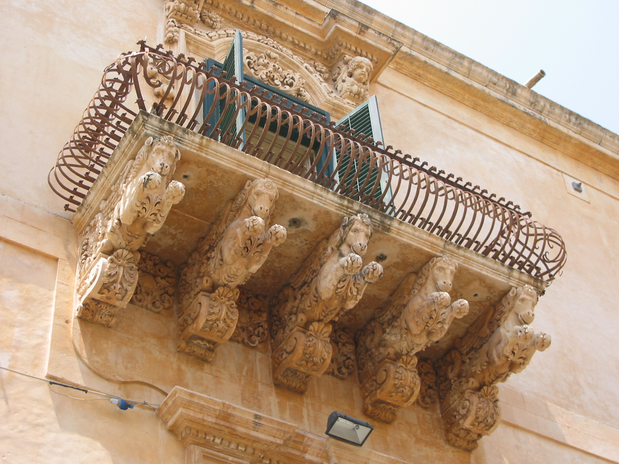 Balcone del Palazzo Nicolaci di Villadorata a Noto, in Sicilia [Italy]